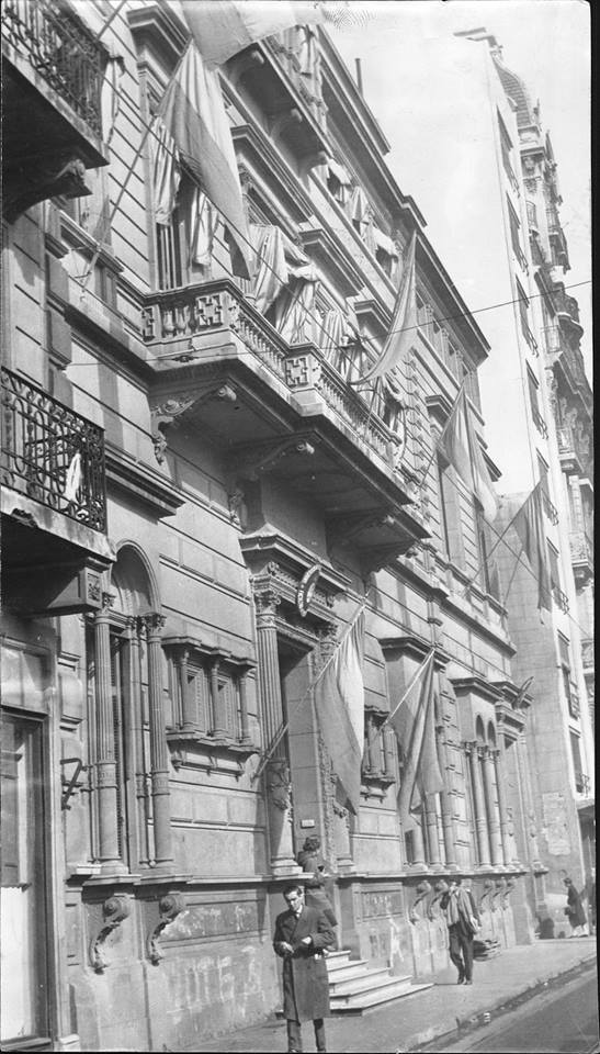 Facultad de Filosofía y Letras (Universidad de Buenos Aires) Vista del frente de la Facultad. Año 1957 Documento fotográfico. Inventario N° 8055